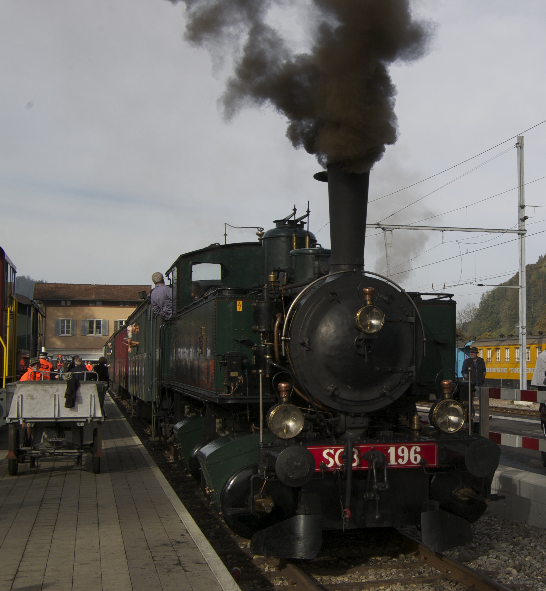 Tender-Locomotive C4 Nr. 196 der Schweizeriſchen Centralbahn, gebaut 1893 iñ der Locomotiv-Fabrique J. A. Maffei zů München (Fabricationsnr. 1710), 1902 als Ed 2×2/2 Nr. 7696 von den Schweizeriſchen Bundesbahnen übernom̃en, 1938 außer Dienſt geſtellt, 1958 in Originalzůſtand verſetzt; aufgnom̃en am 12. Oct. 2014 im Bahnhofe von Bauma.